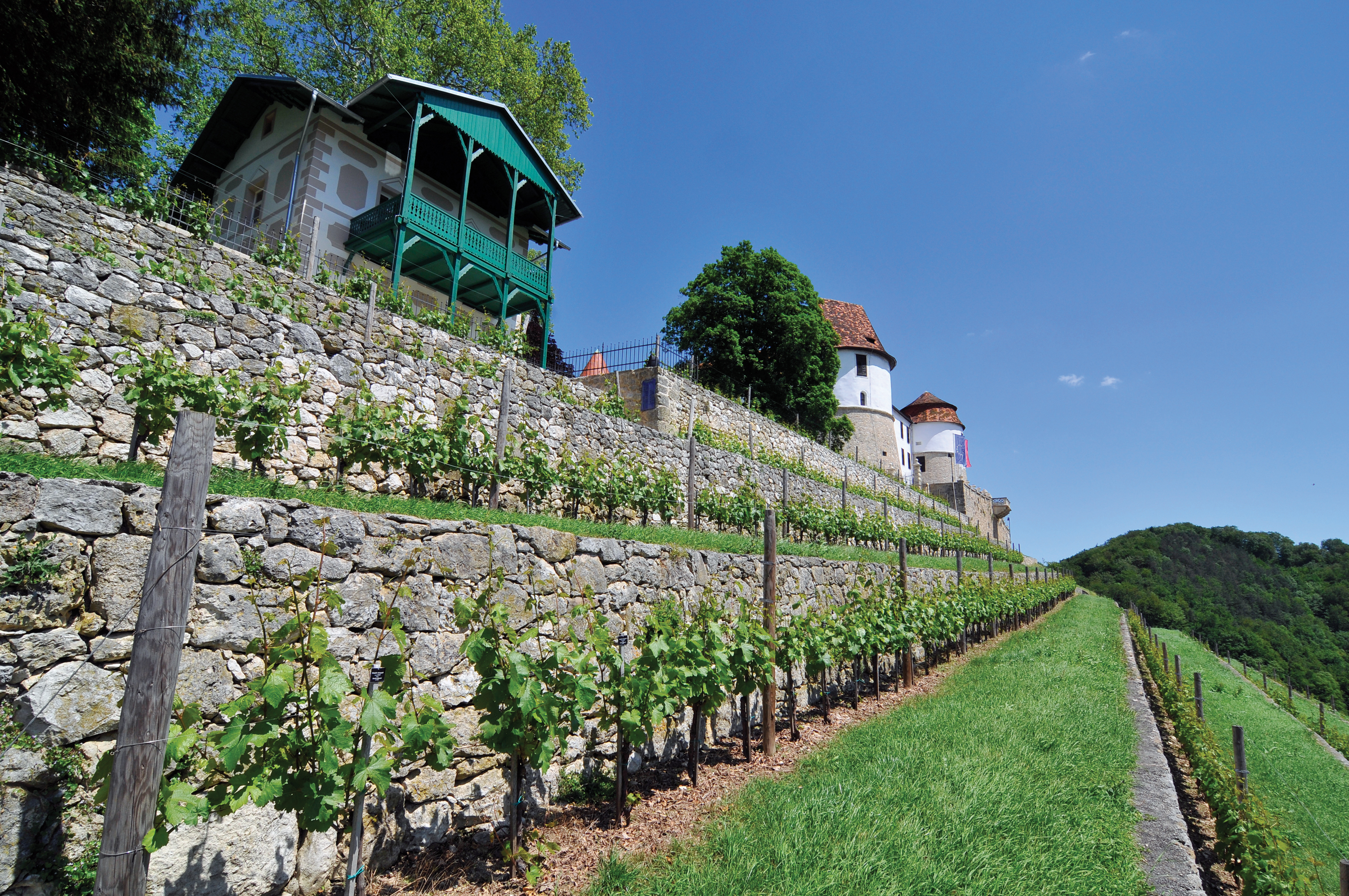 Grajski vinograd z vilo